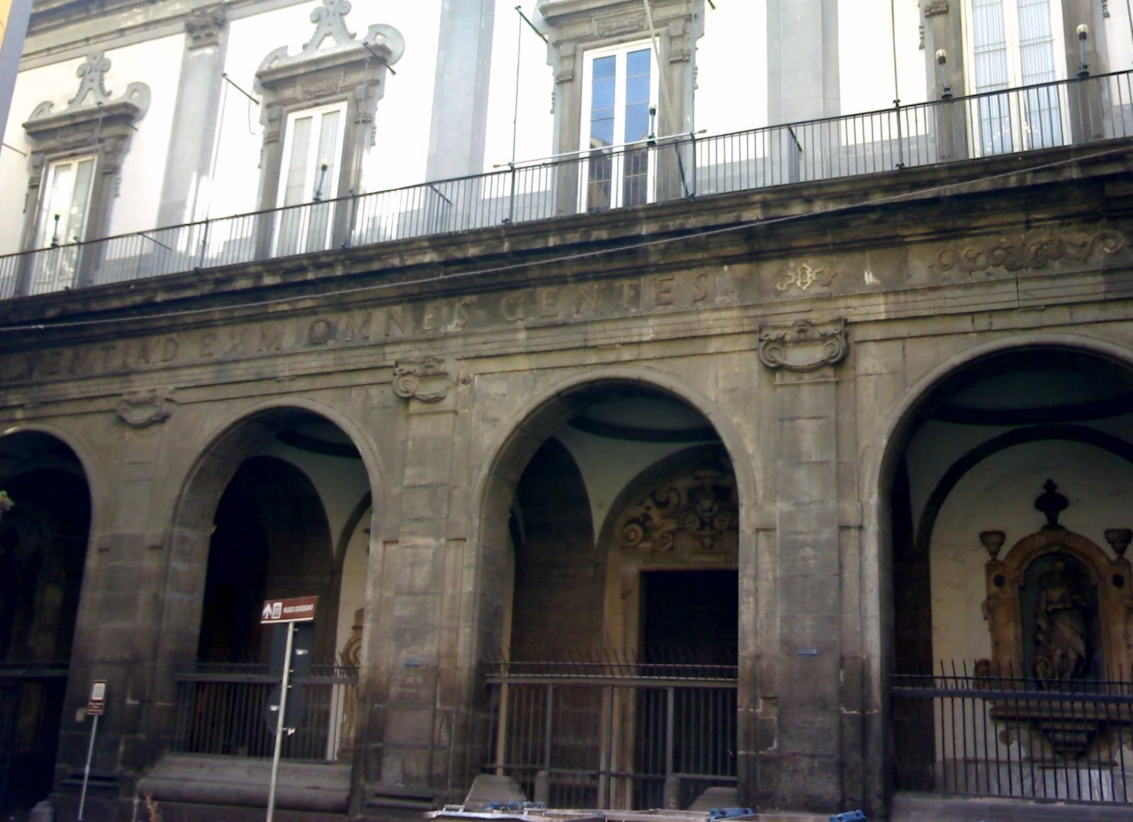 Facciata del Pio Monte della Misericordia (Napoli).